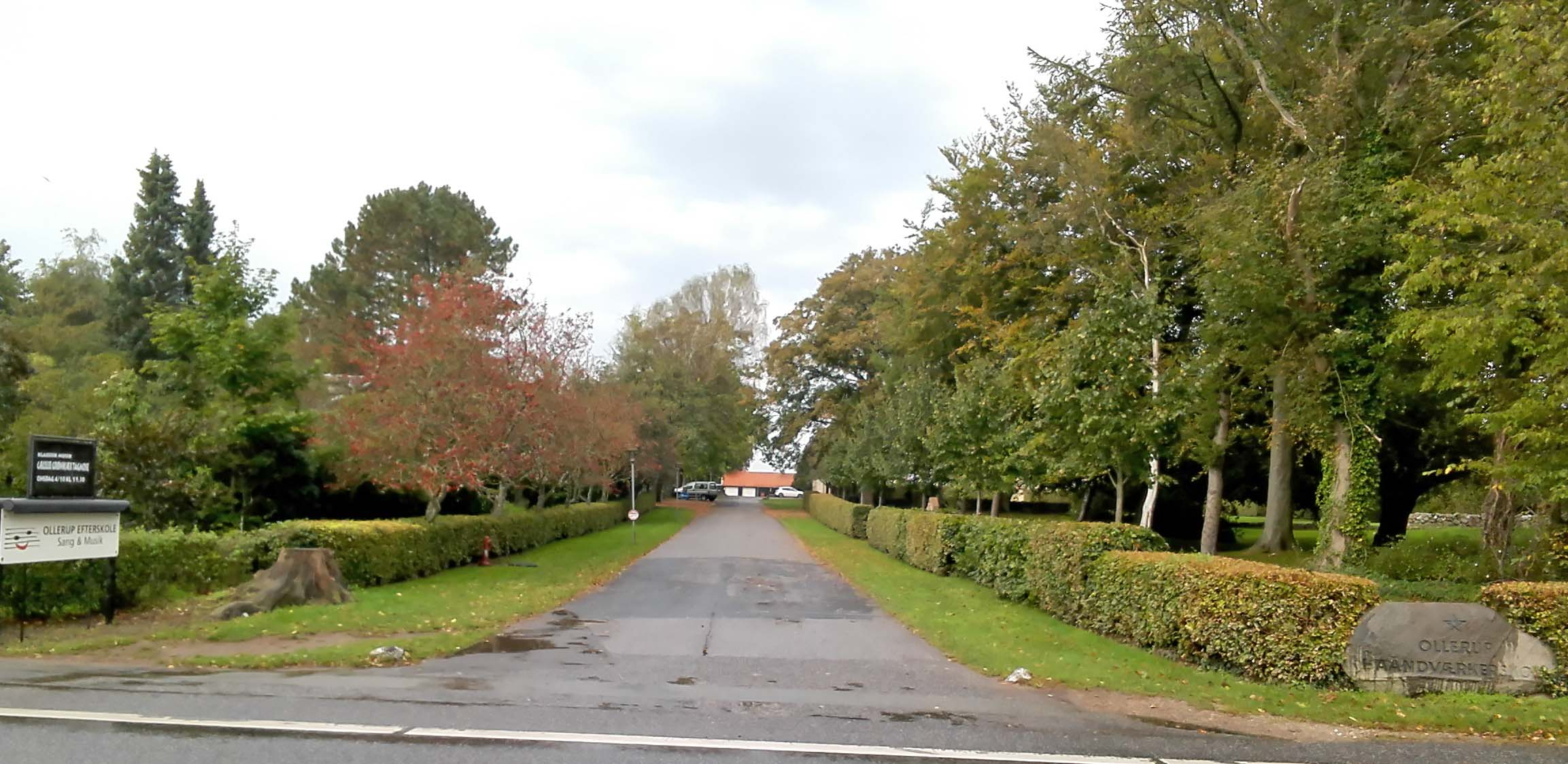 Ollerup Efterskole, tidligere Ollerup Håndværkerskole